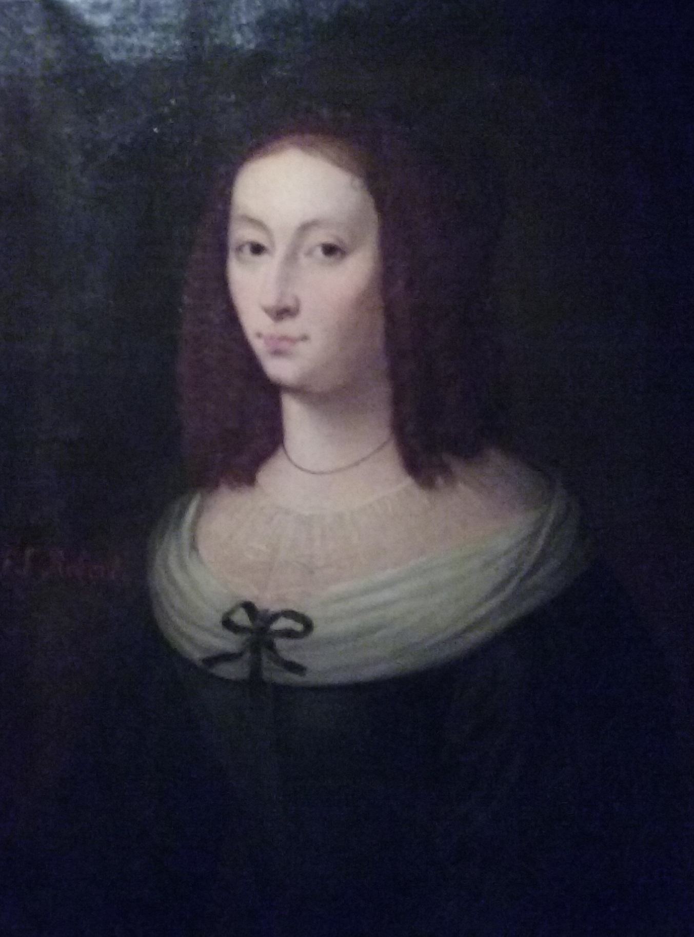 Portrait de Gilberte Périer, Musée Mandet, Riom.